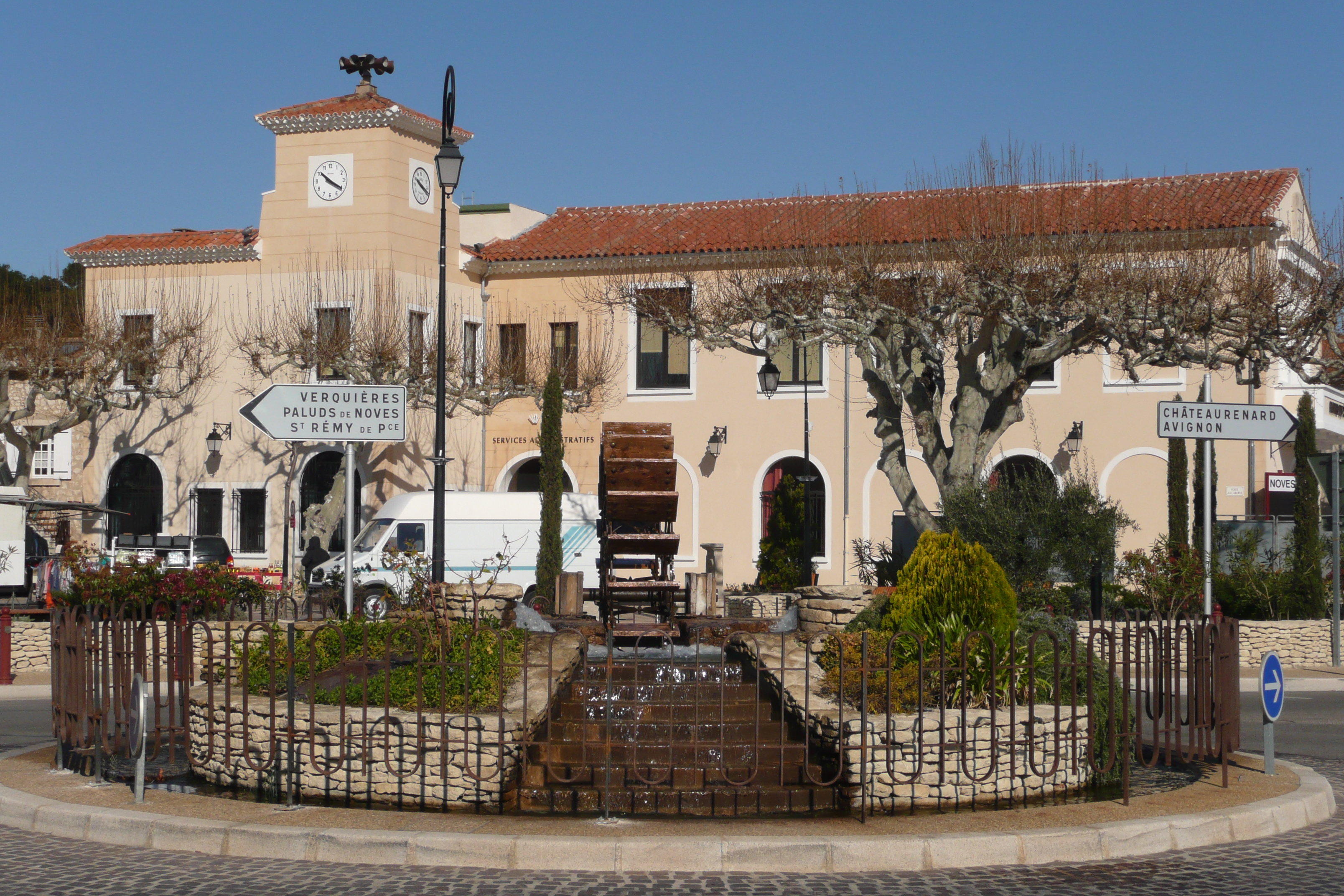 Noves.